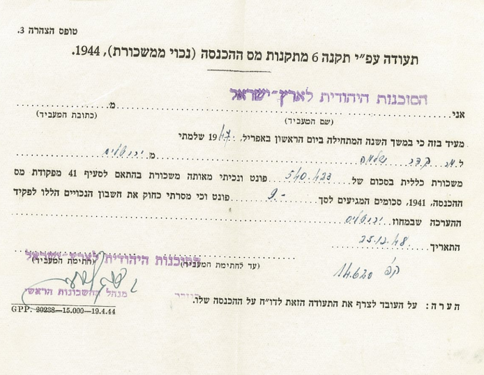 אישור על תשלום משכורת וניכוי מס הכנסה במקור (מקביל לטופס 106 של ימינו) בעת שירותו של שלמה קידר כמאבטח הקונגרס היהודי בבאזל